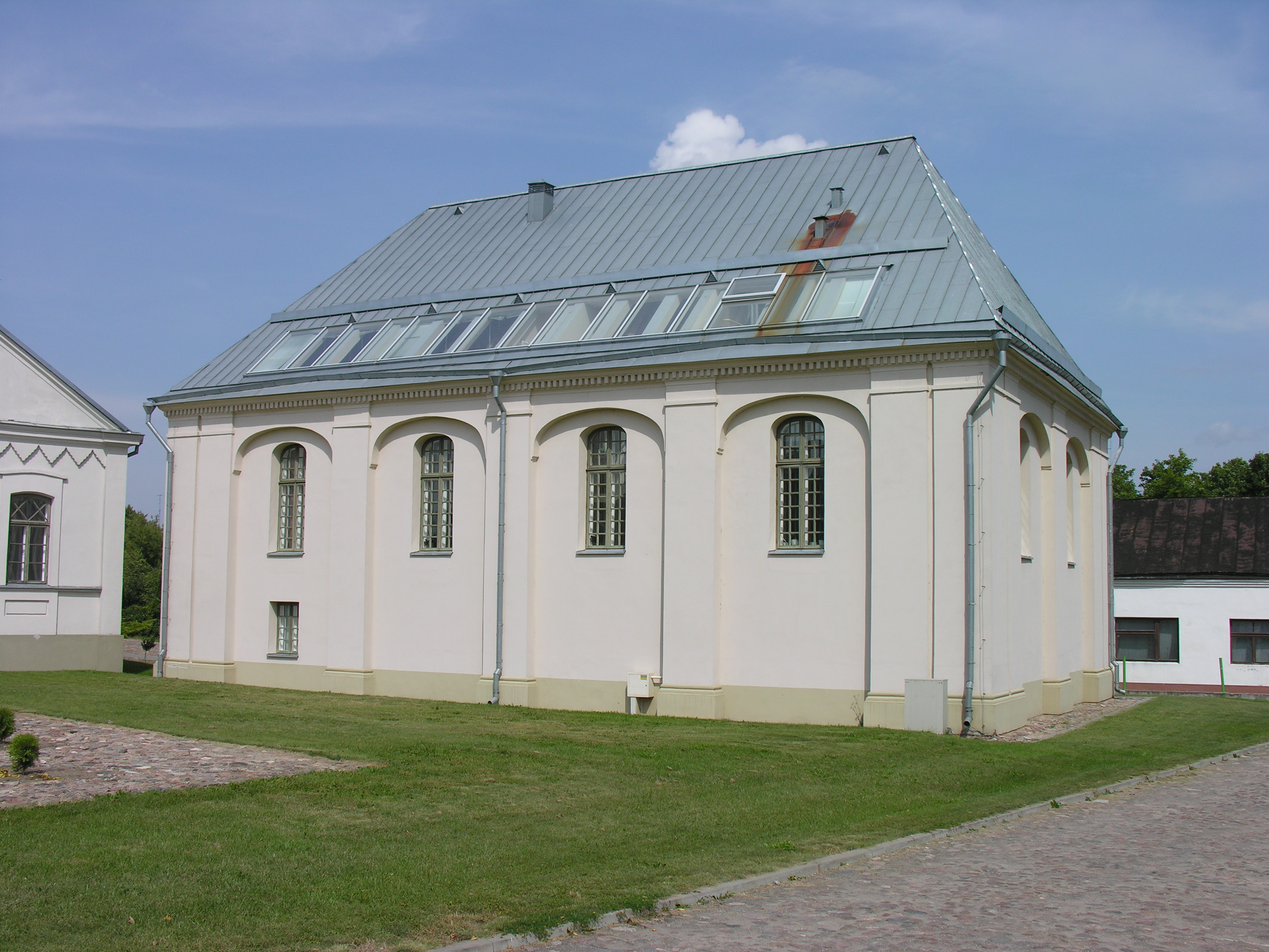 Stara Synagoga w Kiejdanach